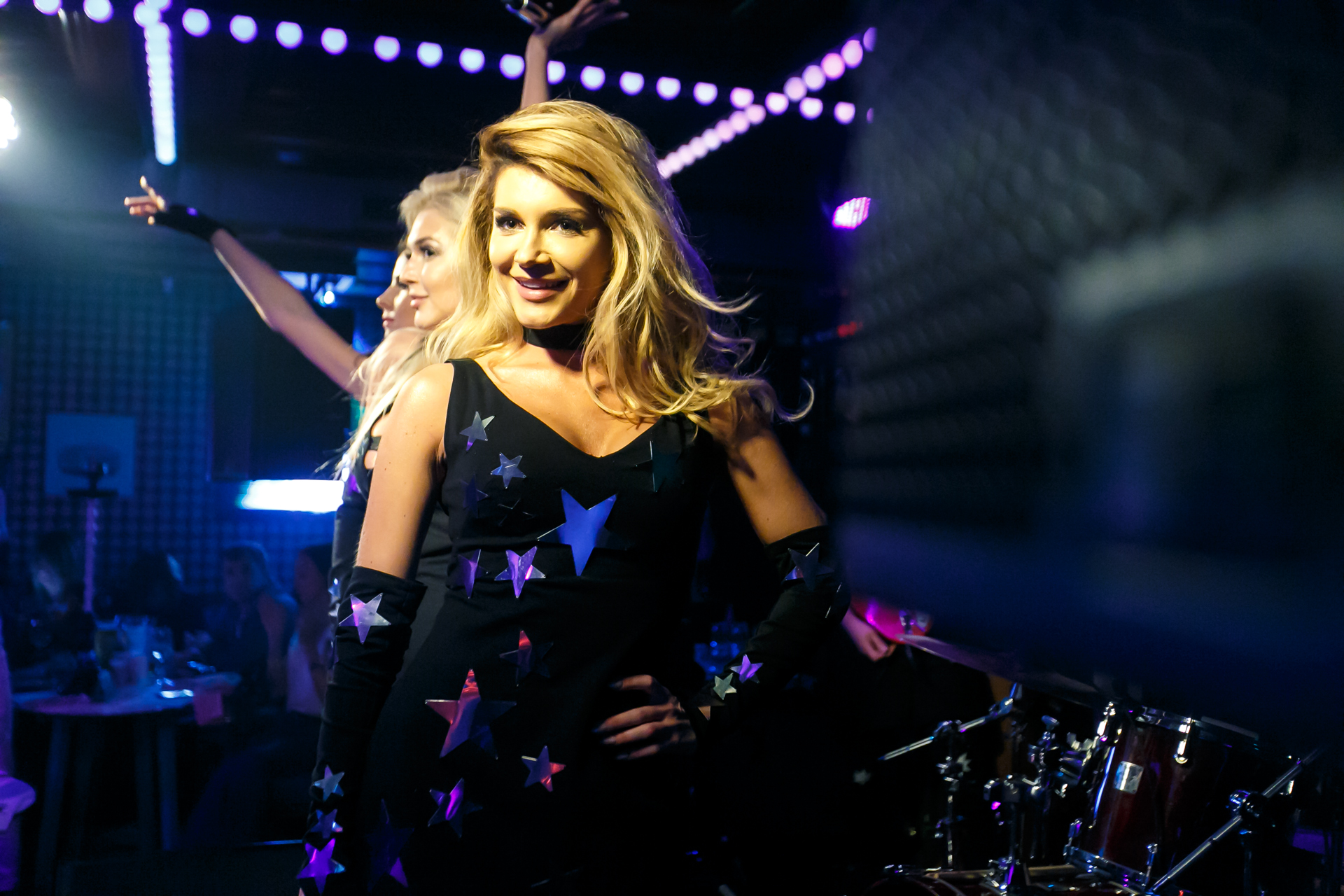 Миша Романова в составе группы «ВИА Гра» во время концерта в ресторане «Пряности & Радости»